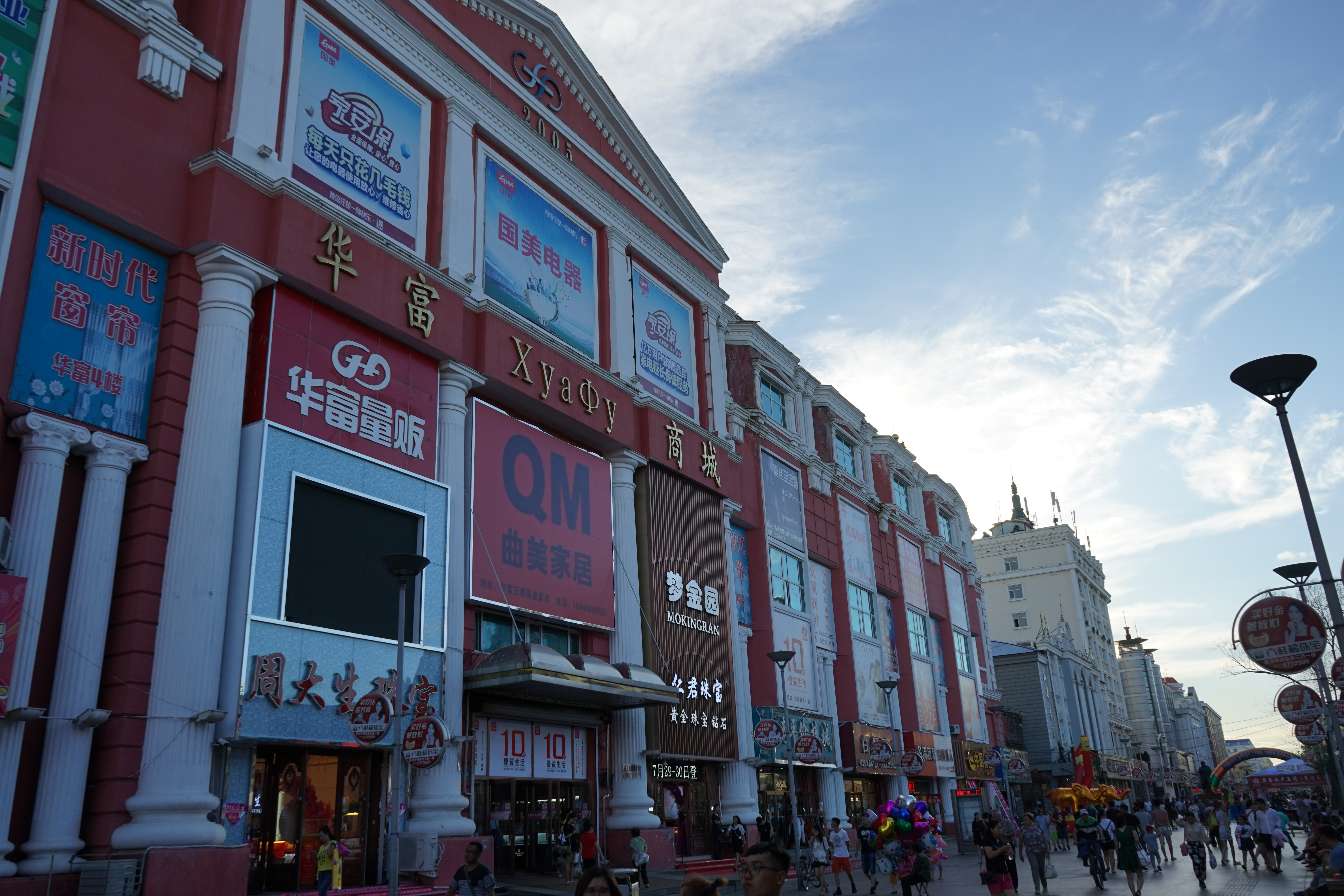 黑河中央商业步行街